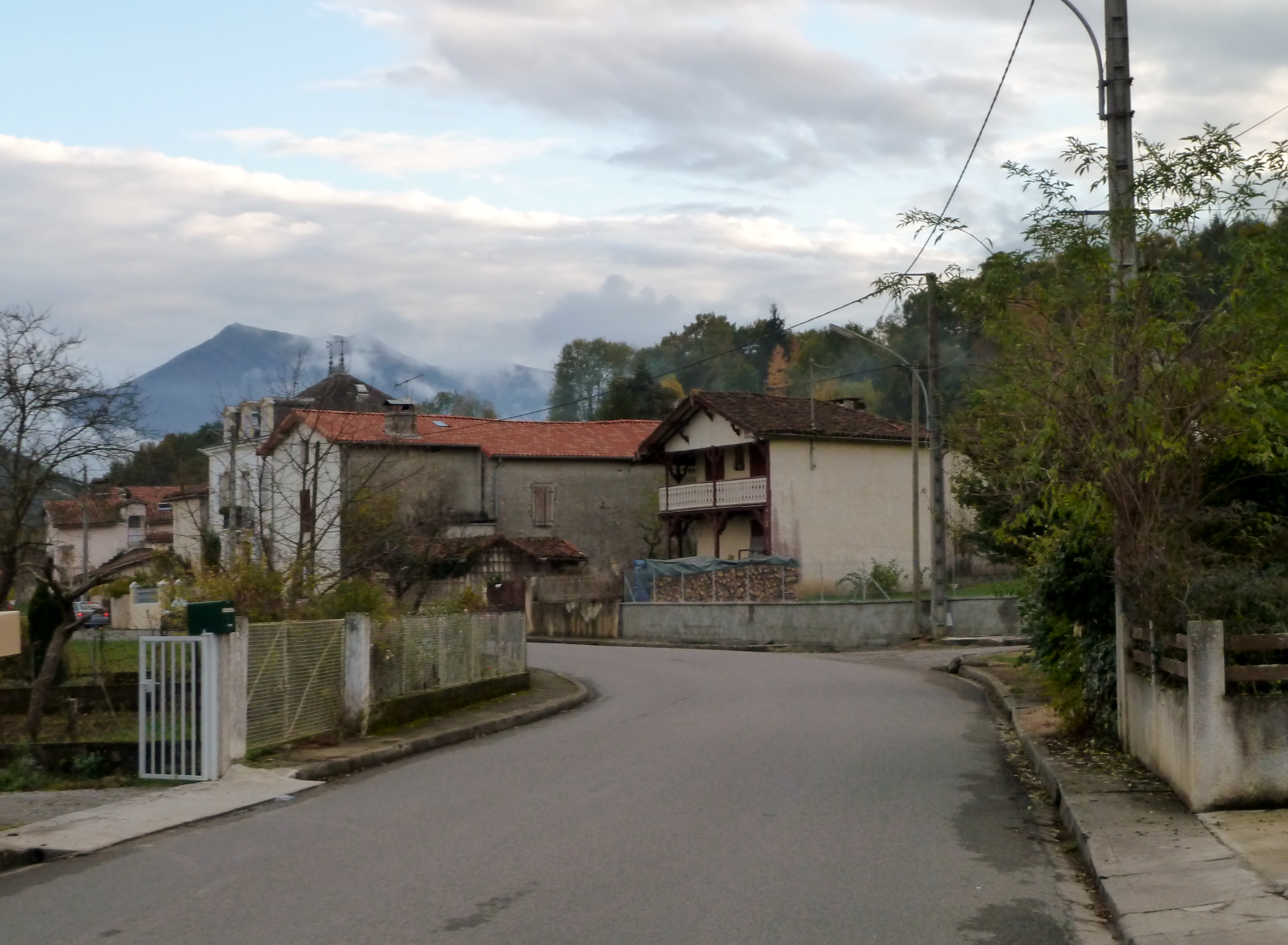 Encausse-les-Thermes